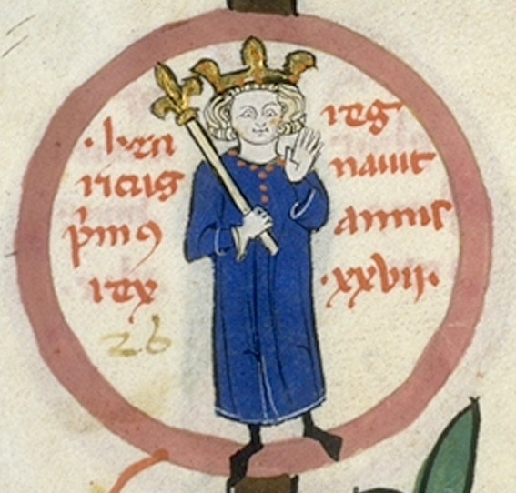 Henry I of France